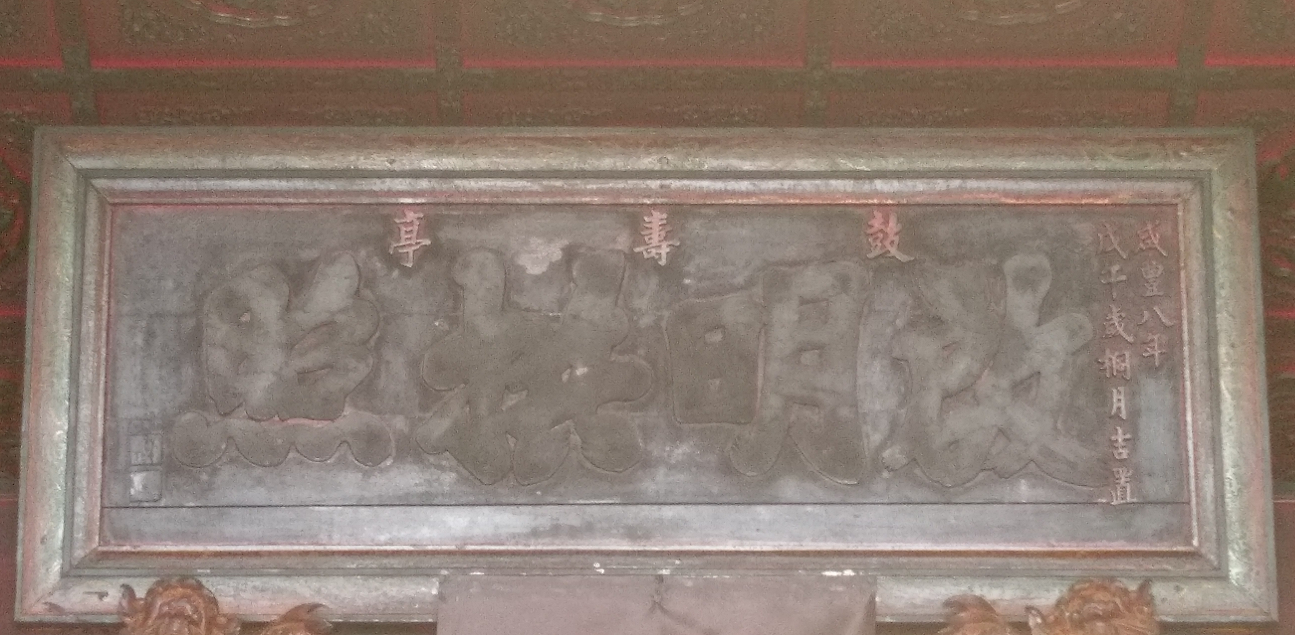 中文（台灣）: 大清咸豐8年（公元1768年）匾額「啟明拱照」